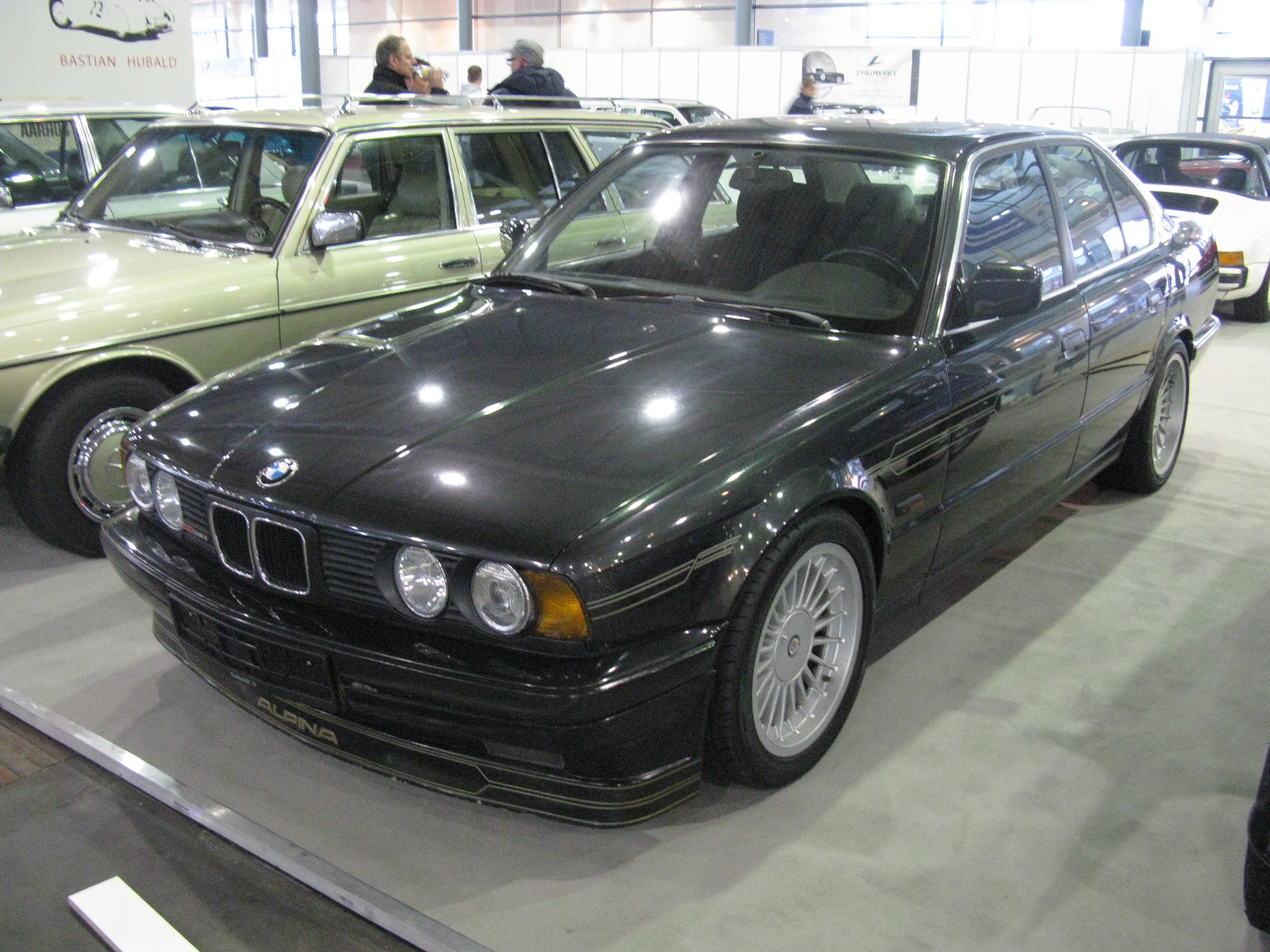 BMW Alpina B10 3.5 E34